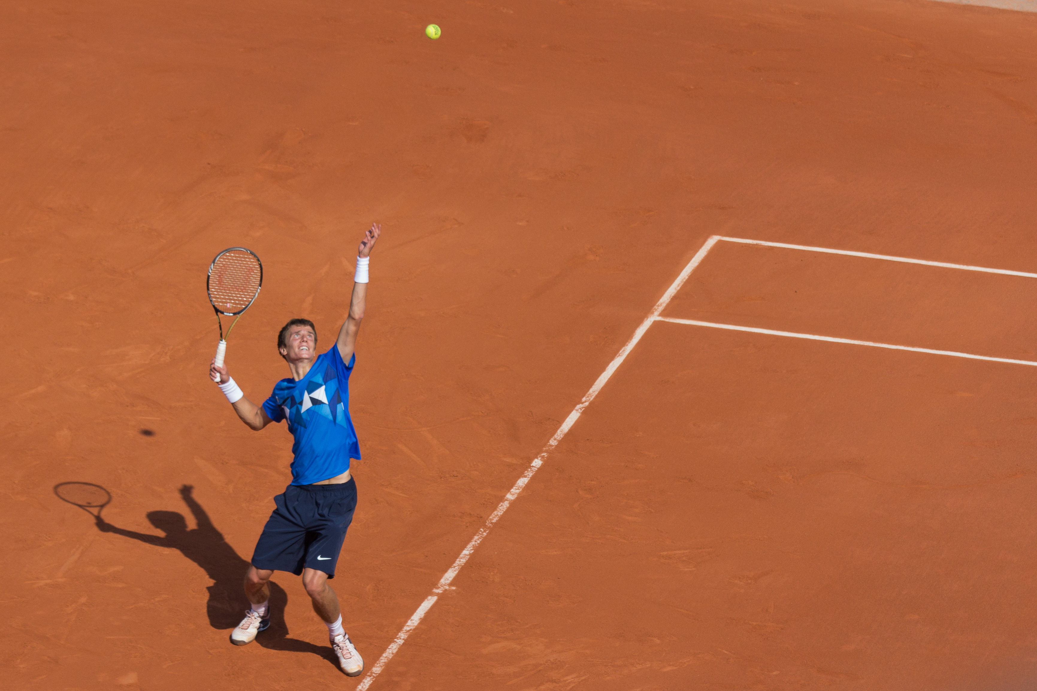 Andrey Kuznetsov à Roland-Garros le 27 mai 2012, match contre Jo-Wilfried Tsonga. Paris, France